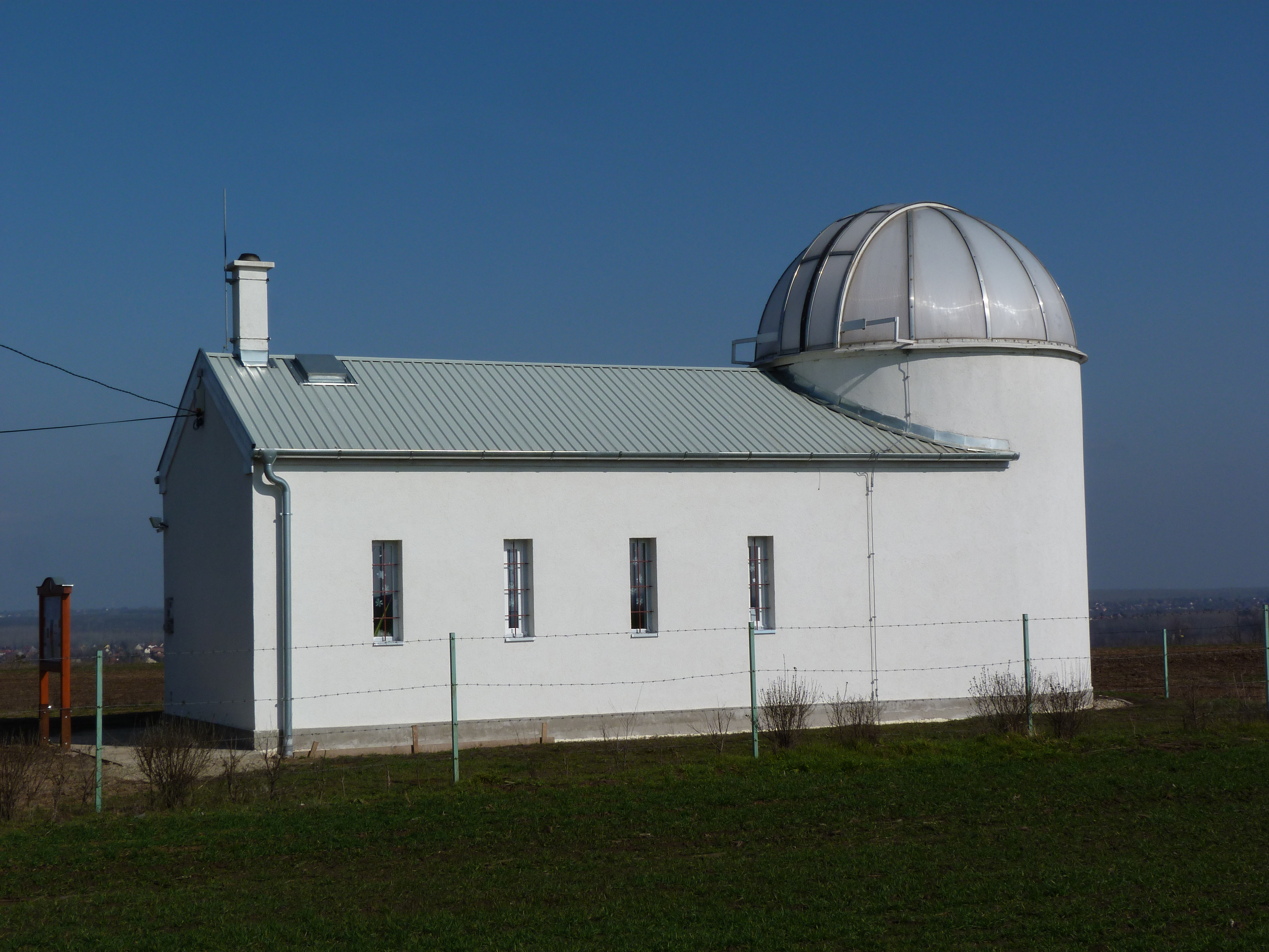 A felvétel 2014. február 26 -án készült Sülysápon. Csillagvizsgáló. ©© Derzsi Elekes Andor, Budapest, 2014, You are authorised to use these photos and vids under Creative Commons – even for commercial, for profit purposes. Photos must be attributed to Derzsi Elekes Andor. All of the photos and vids in the Metapolisz DVD line are under Creative Commons and can be used even for commercial – for profit – purposes. Recommended Citation Derzsi Elekes Andor: Metapolisz DVD line